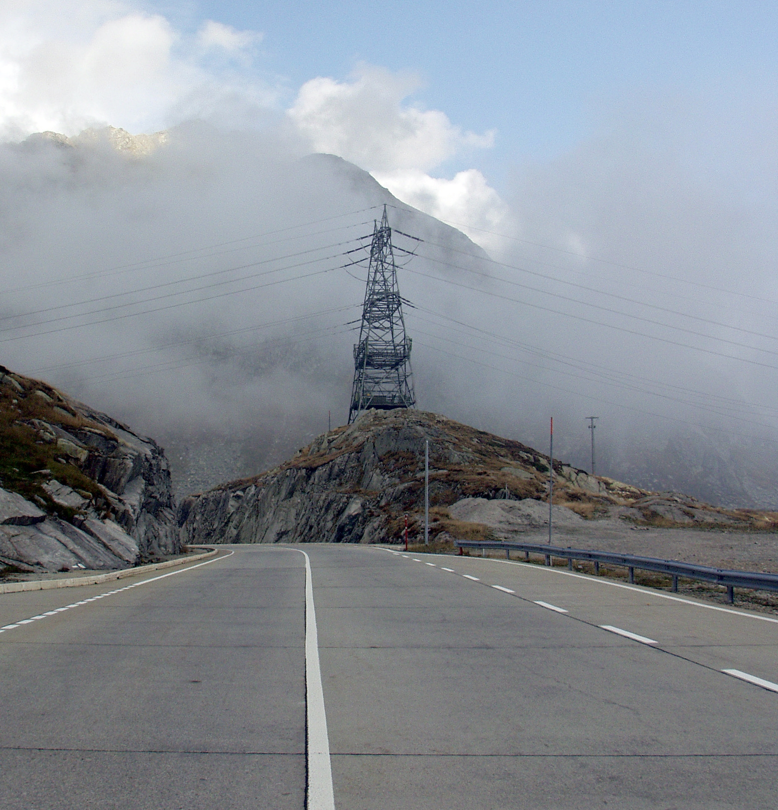 Abspannmast mit Gotthardleitung (oben) und zwei 132-kV-Bahnstromsystemen (unten) sowie diversen Telekommunikationsanlagen auf der Sankt-Gotthard-Passhöhe.